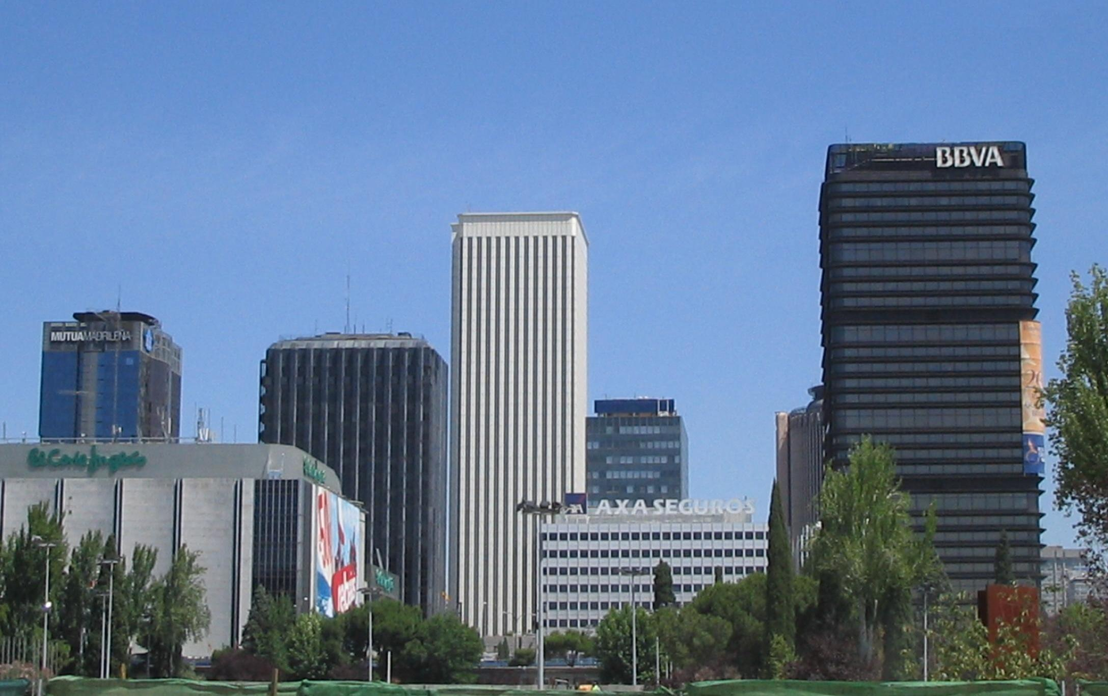 AZCA, in 2006 (Madrid)